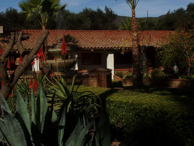 Mission San Antonio de Pala